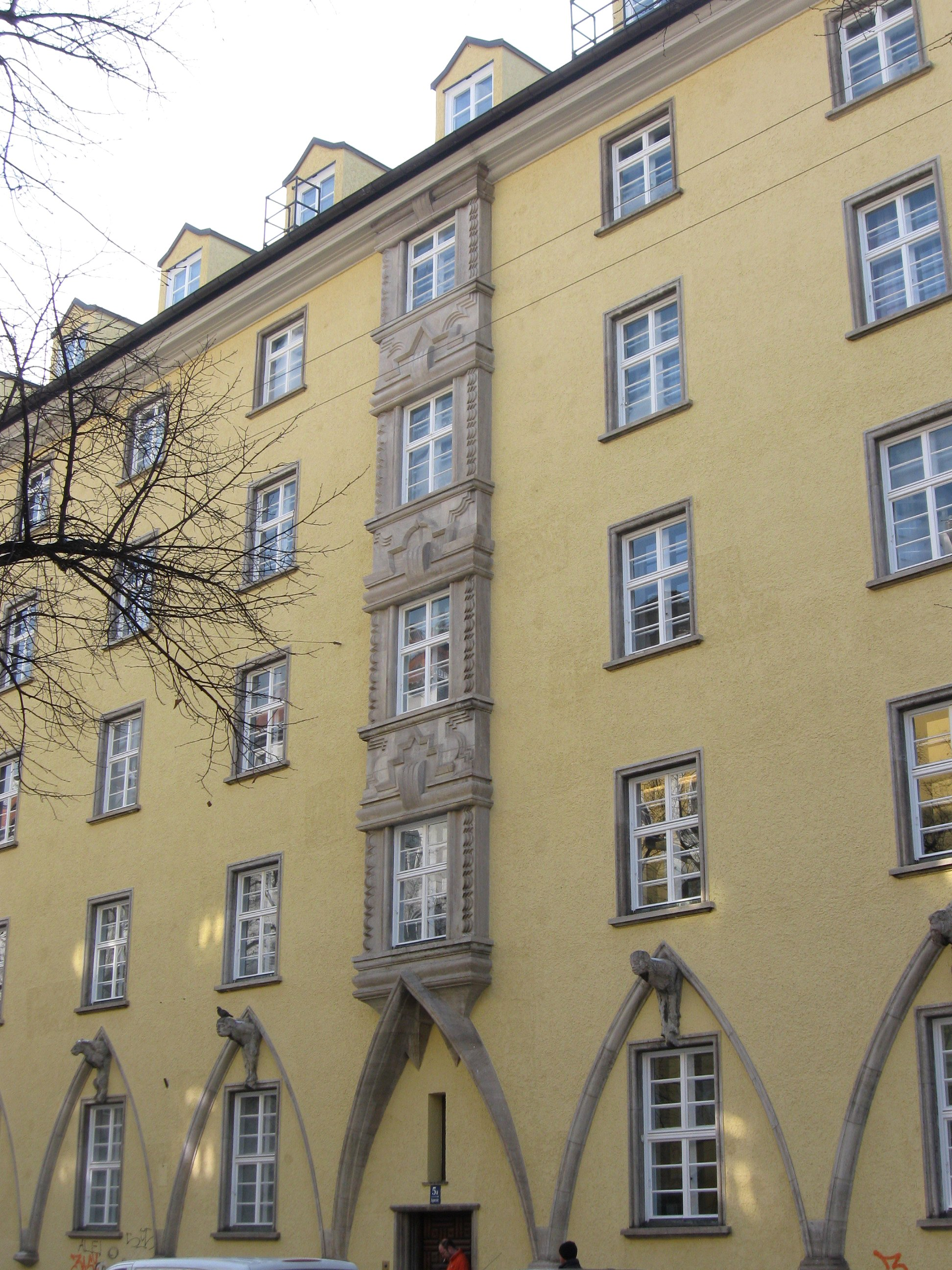 Agnesstraße 1/3/5; Postamt, fünfgeschossiger Walmdachblock mit Anklängen an den Expressionismus und reichem Steinfigurenschmuck, 1925-1926 von Robert Vorhoelzer und Franz Holzhammer; mit Isabellastraße 16.D-1-62-000-88